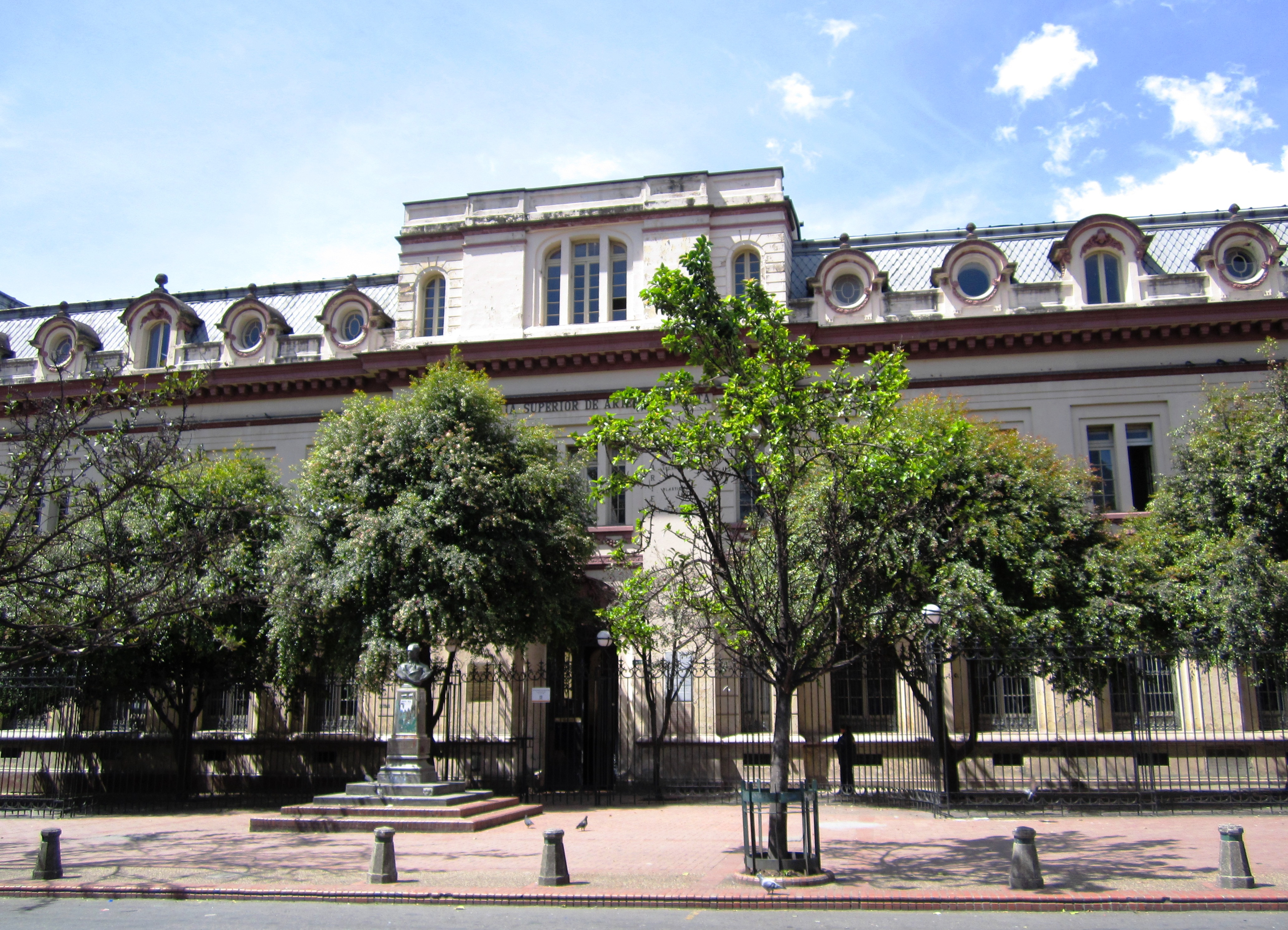 Bogotá Facultad de Artes - ASAB - Universidad Distrital Francisco José de Caldas. Carrera 13 # 14 - 69, Carrera 13 # 14 - 69, Bogotá.